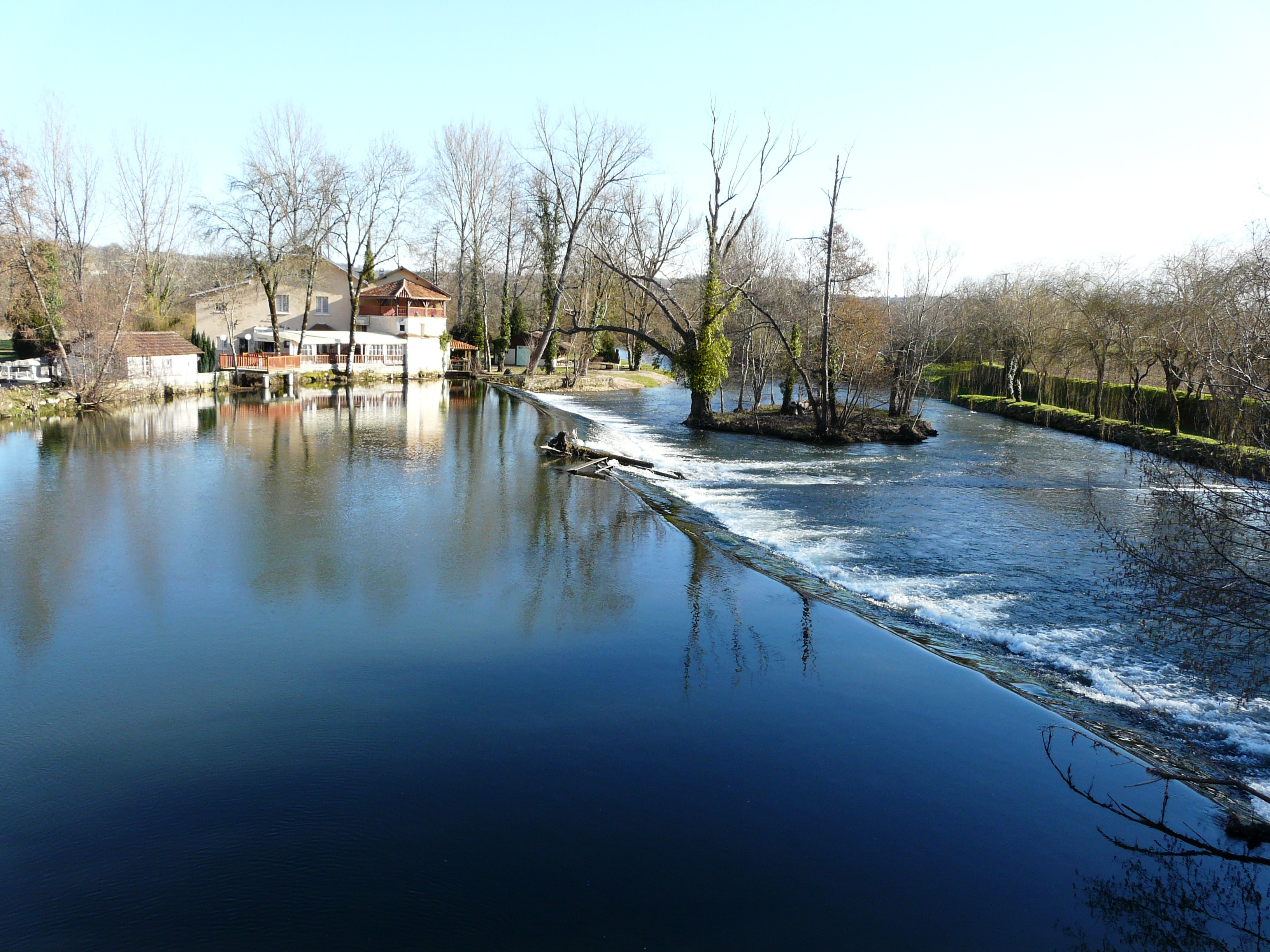 La Dronne en aval du pont de la route départementale 1, Lisle, Dordogne, France.